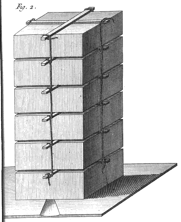 Ruche de M. du Carne de Blangy (Jacques Joseph Ducarne de Blangy). Rozier, Jean-François, Cours complet d'Agriculture, tome I, planche 2, figure 2